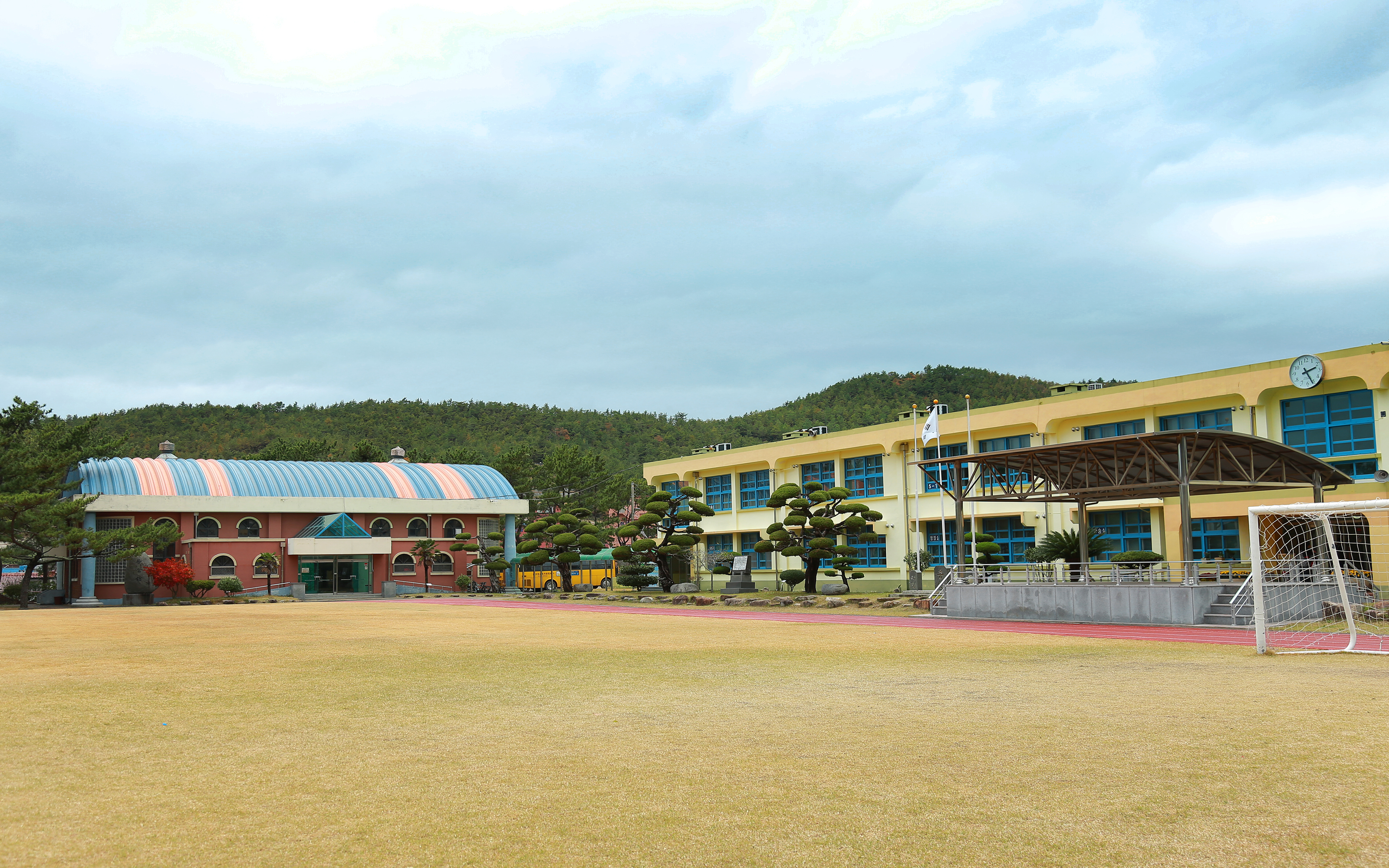 금산초등학교